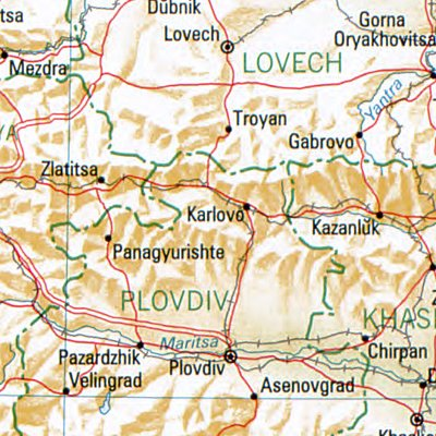 Karlowo – Lage der Stadt in Bulgarien